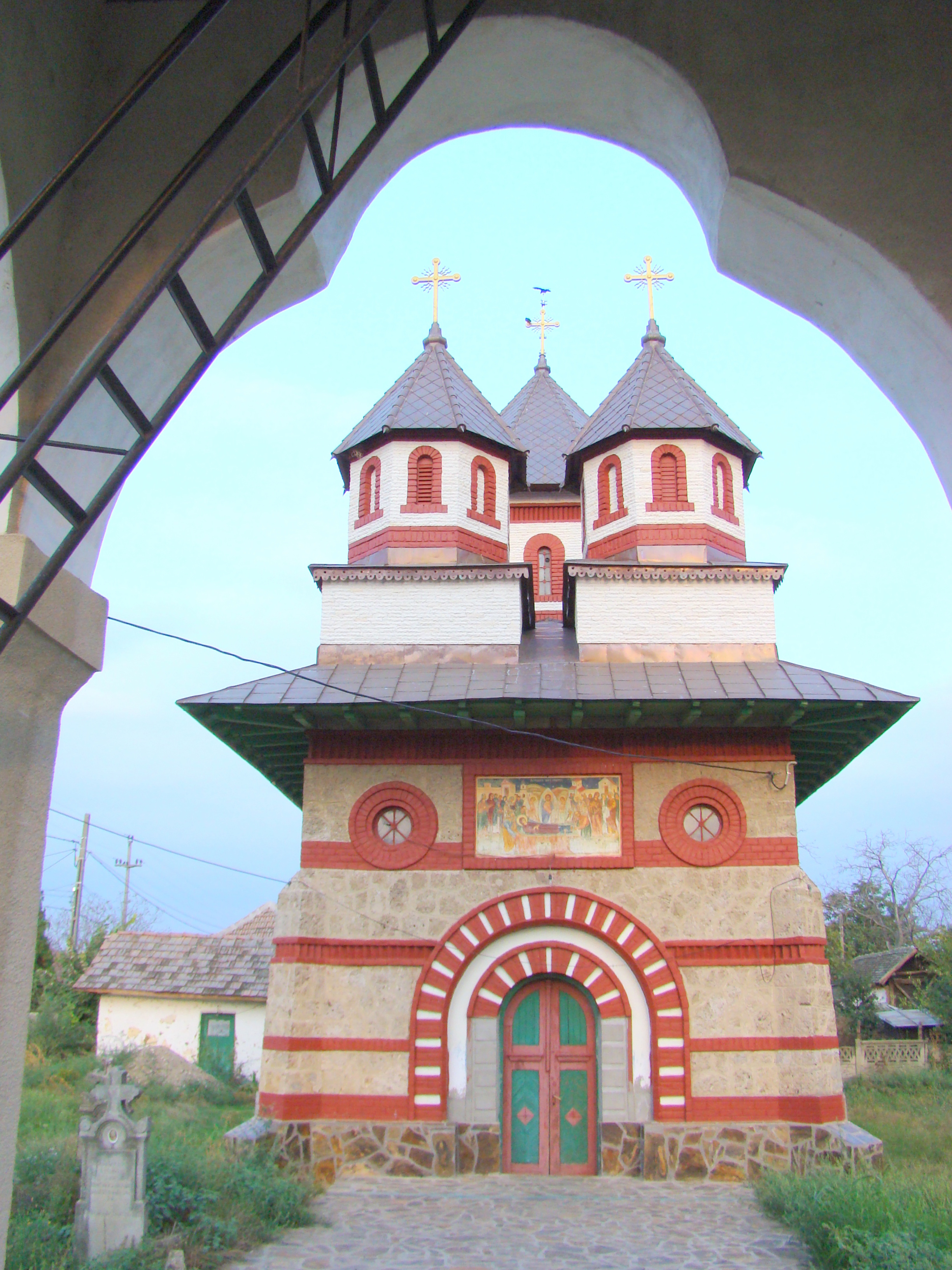 Biserica ortodoxă din Gruia, județul Mehedinți